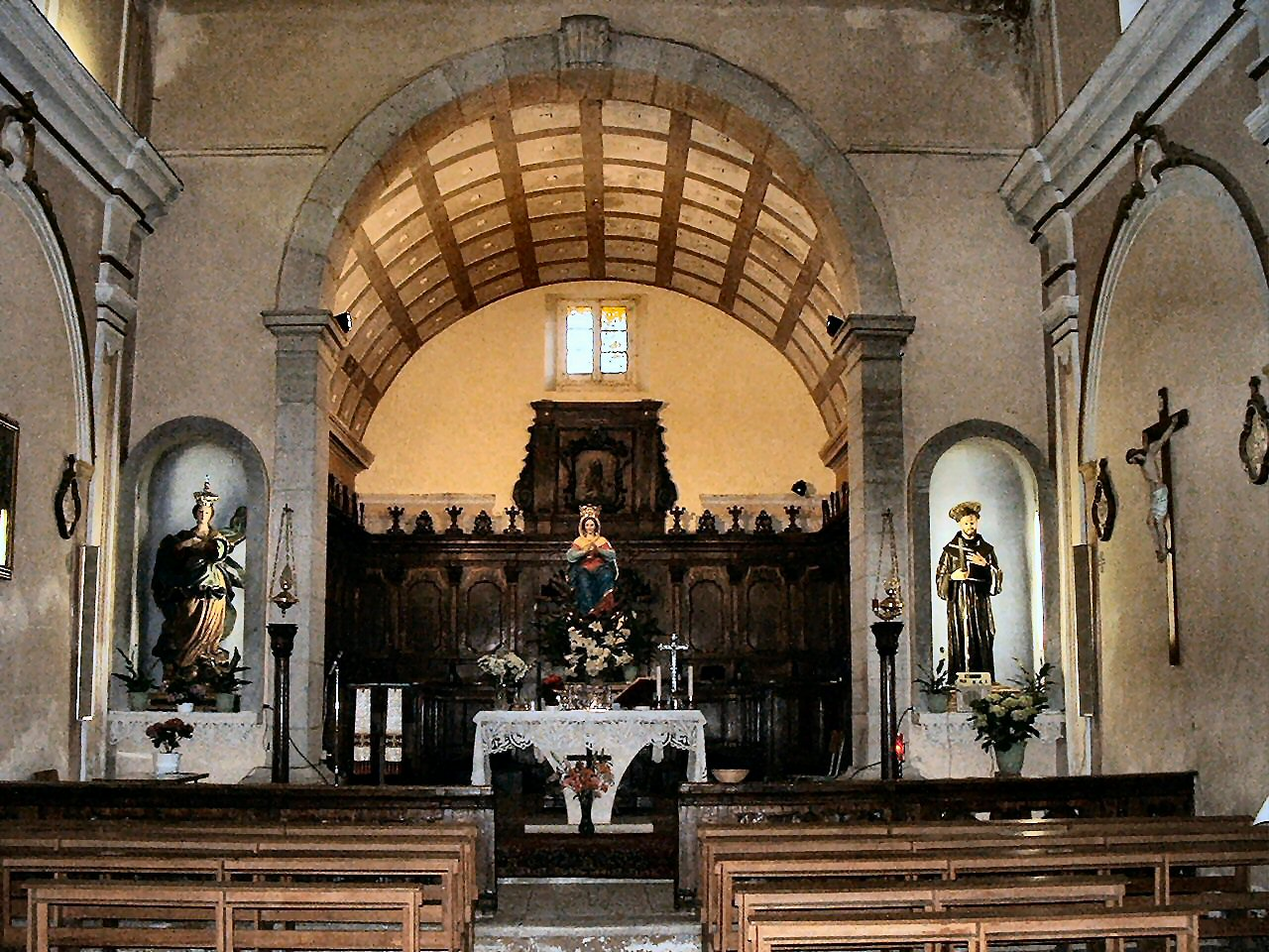 Interno del convento di San Francesco a Zungoli.